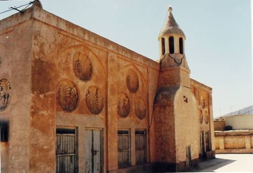 Masjed_Qadim.B Photo BY Jafaar